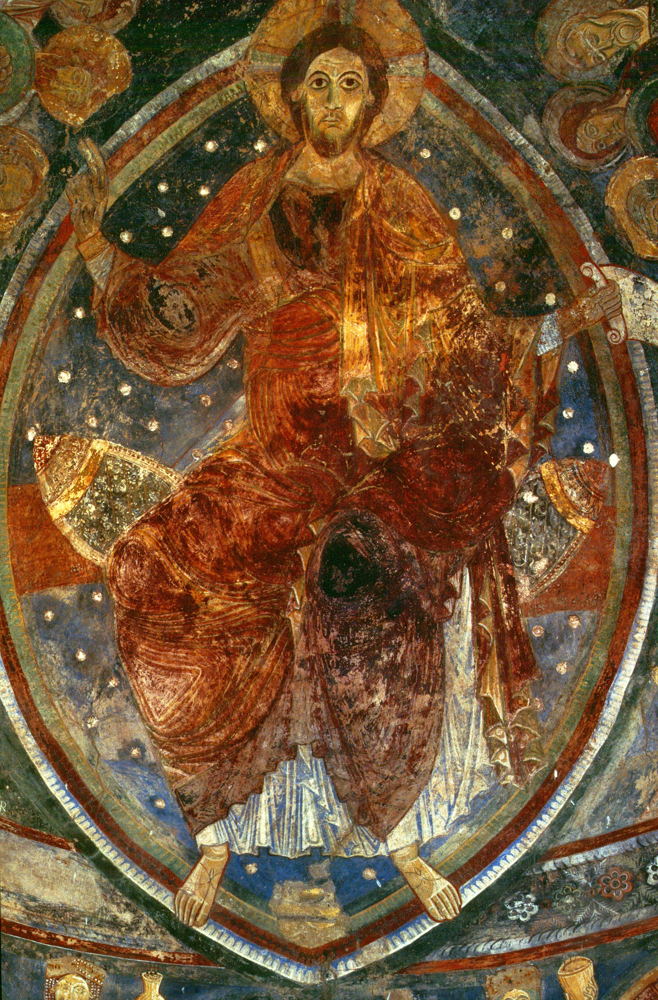 Berzé-la-Ville: Chorfresken in der Chapelle des Moines